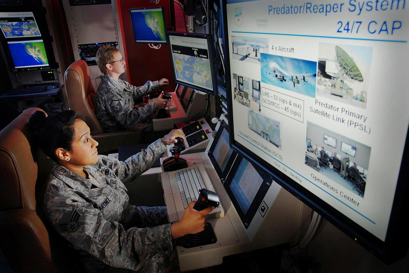 U.S. Air Force Master Sgt. Jennifer Oberg, background, a communications maintenance instructor, and Senior Airman Raquel Martinez, foreground, check a ground control station during training at March Air Reserve Base, Calif., April 19, 2010. Both are assigned to the 163rd Maintenance Group at March. The California Air National Guard unit is primarily involved in Predator unmanned aerial vehicle missions.